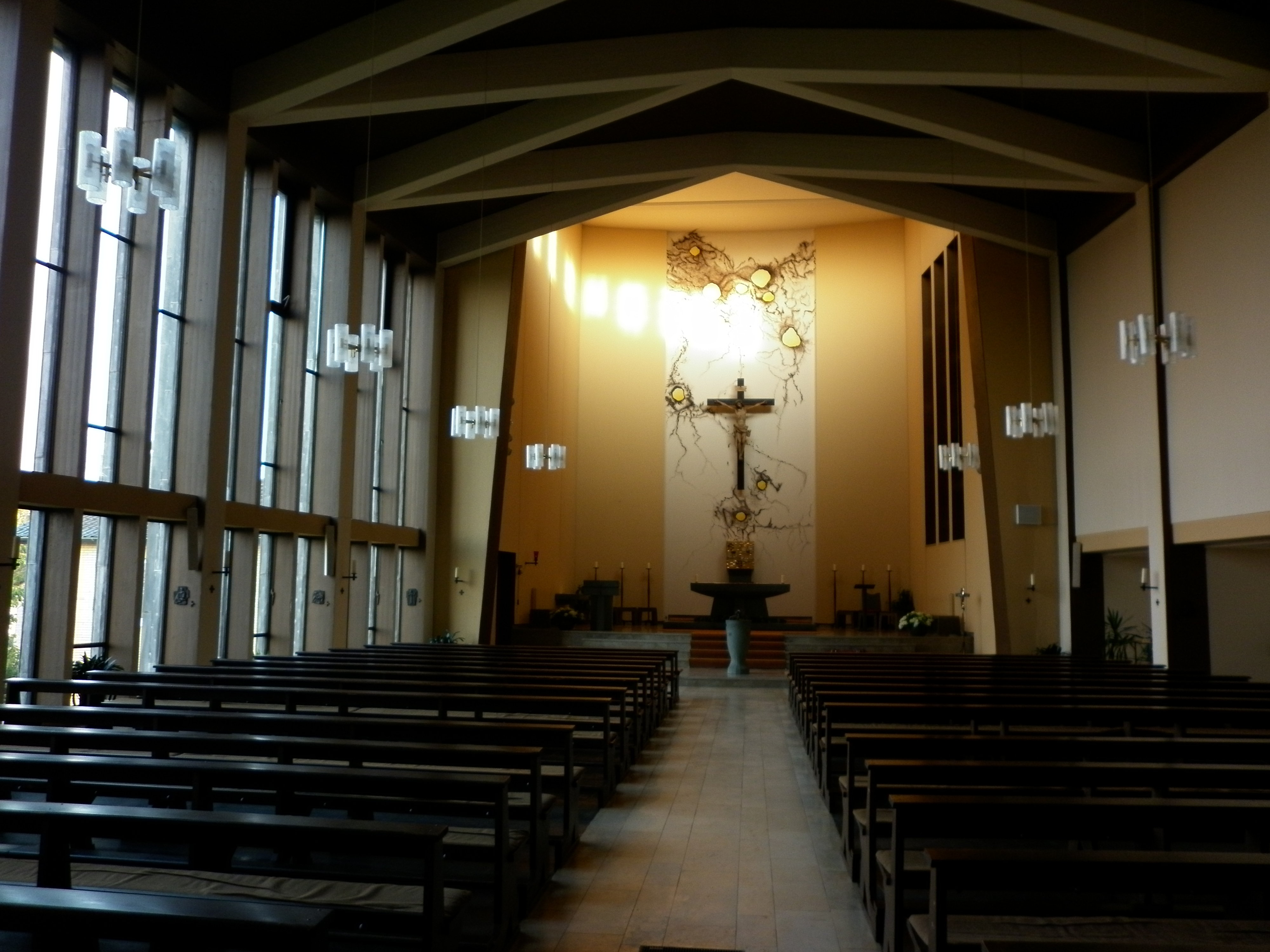 Blick auf den Altar. Am linken Bildrand sieht man die charakteristische Fensterfront.